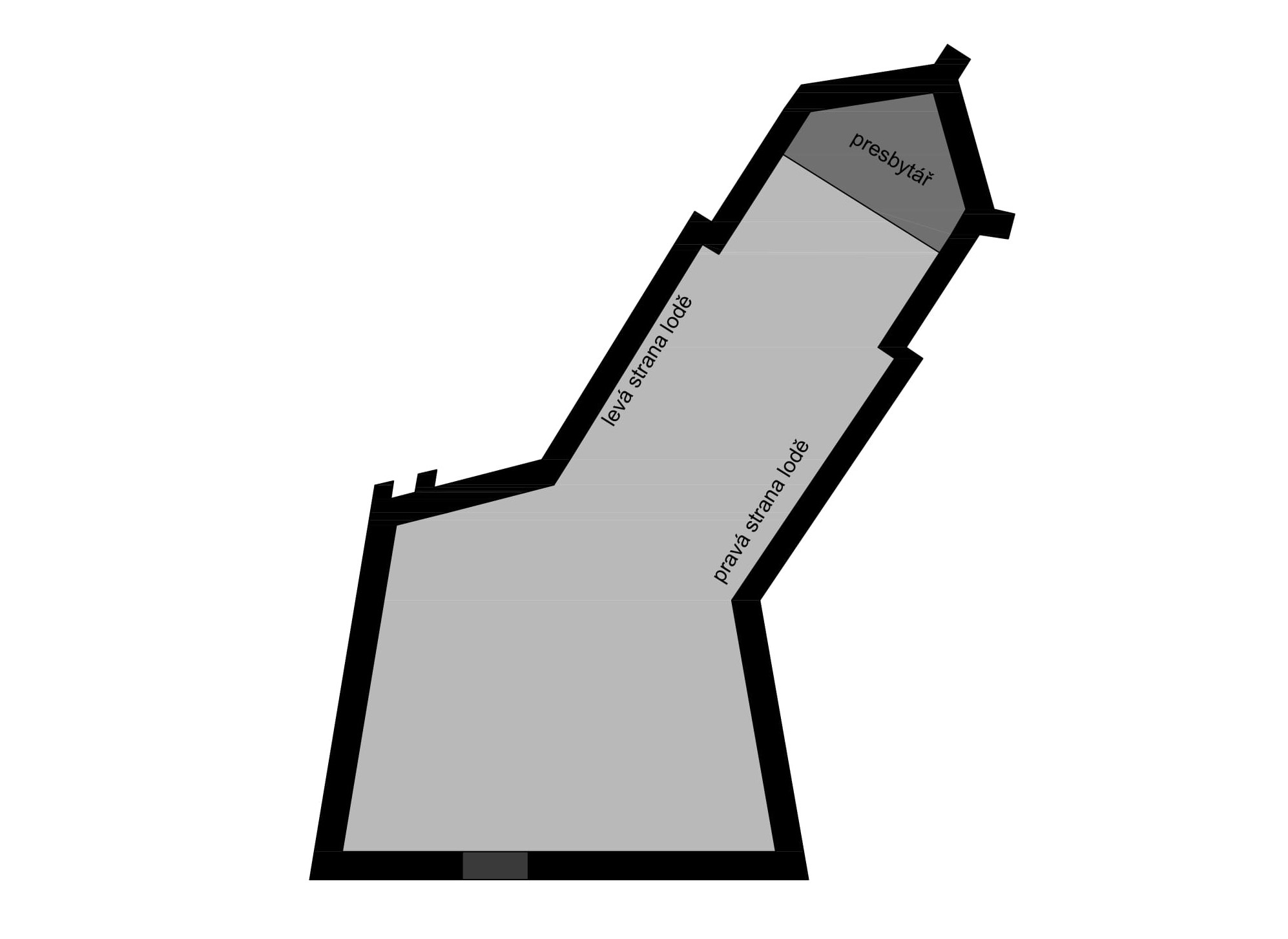 Pudorys Kostol sv. Jána Křtitele